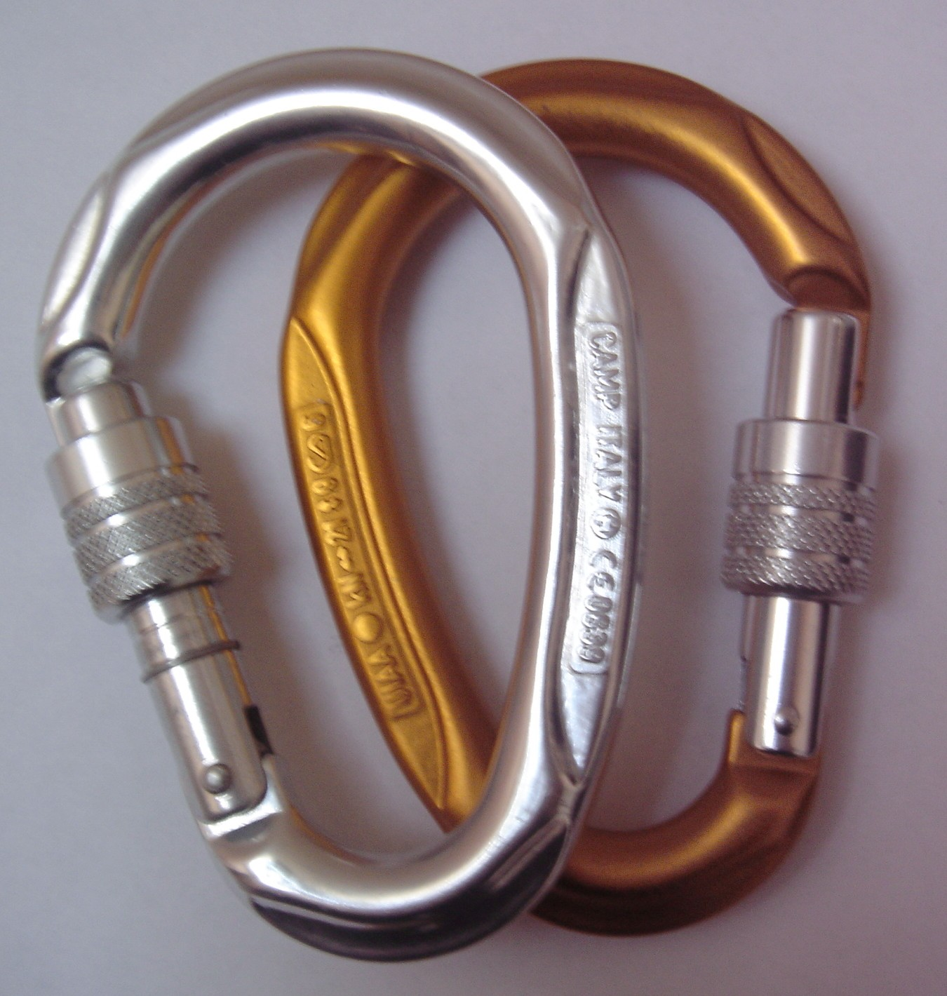 Deux mousquetons inversés. Pour Wikibooks.